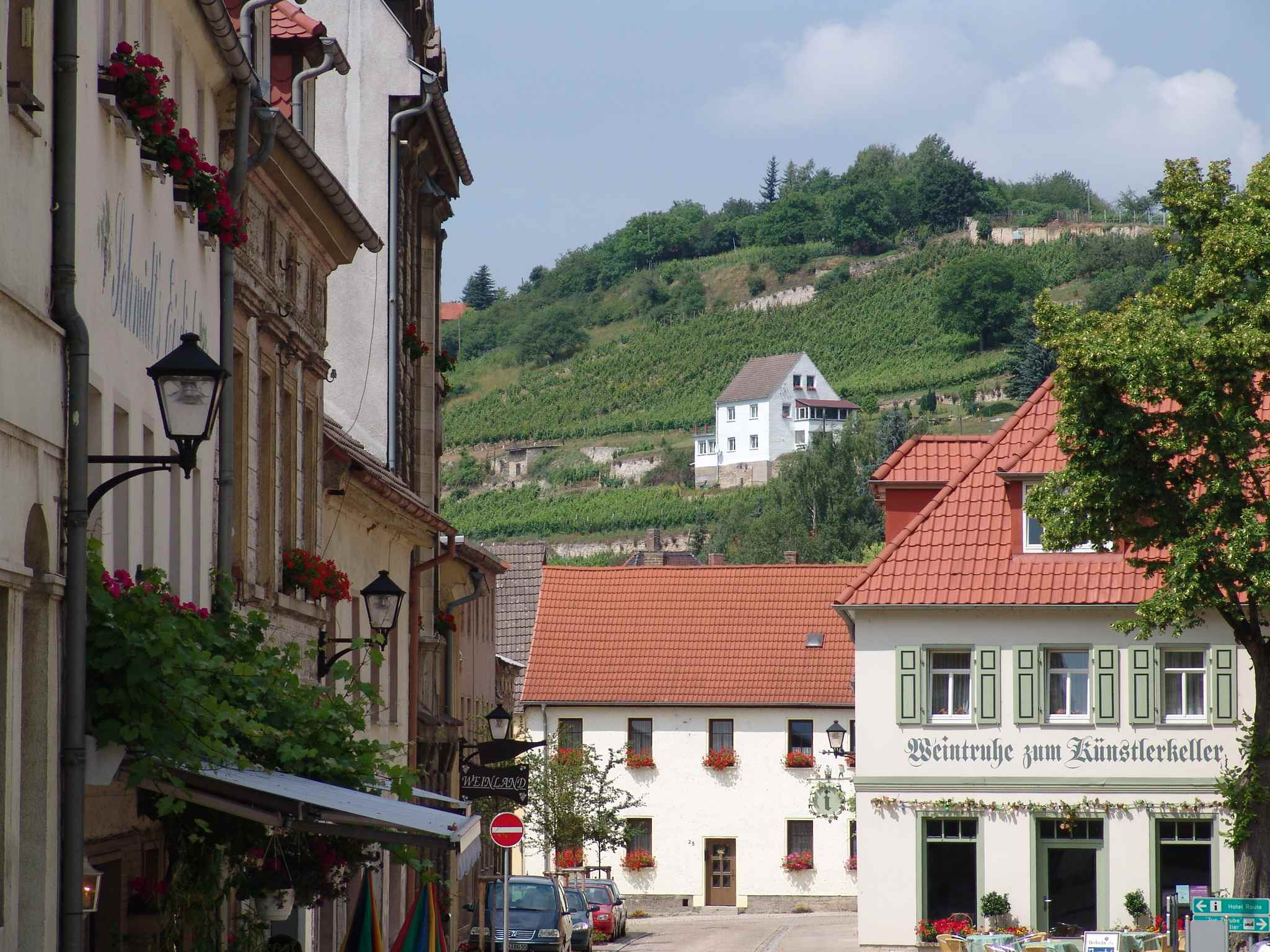 Blick vom Markt in Freyburg/Unstrut (2005)